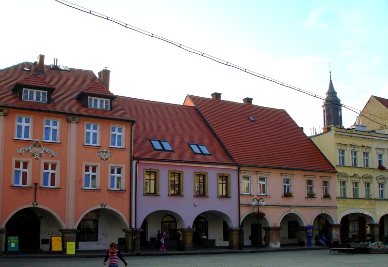 domy podcieniowe, XVIII, XIX/XX Lubawka, pl. Wolności 6-13 (zachodnia pierzeja rynku), Lubawka 11.1956.